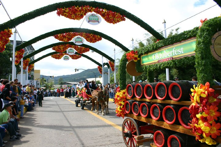 Desfile da 18ª Oktoberfest de Igrejinha